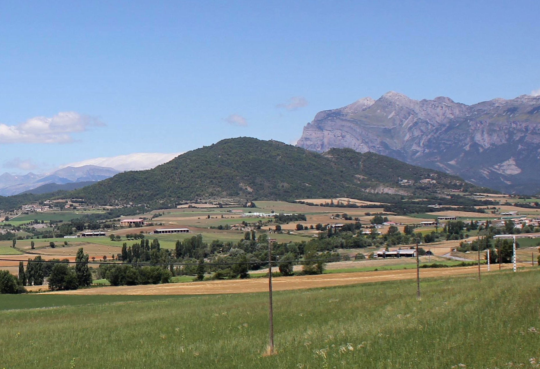 Aragonés: Tozal de Charo